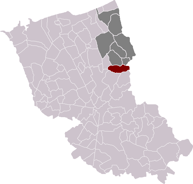 Locatie gemeente Bambeke in arrondissement Duinkerke. Zelfgemaakt. Location of Bambecque municipality in the arrondissement of Dunkirk. Self made. Localisation de la commune de Bambecque dans l'arrondissement de Dunkerque. Fait moi-même.